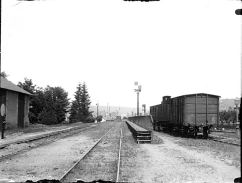 Fonds Trutat - Photographie ancienne Cote : TRU C 2294 Localisation : Fonds ancien (S 30) Original non communicable Titre : Dans la gare, Aurillac, 18 juillet 1898 Auteur : Trutat, Eugène Rôle de l’auteur : Photographe Lieu de création : Aurillac (Cantal) Date de création : 1898 Mesures : : 6,5 x 9 cm Observations : Note manuscrite de Trutat : " Aurillac, dans la gare, puy Mary (?), jumelle Lemardeley, 18 juillet 1898 ". Mot(s)-clé(s) : -- Gare -- Voie ferrée -- Rail -- Wagon -- Rampe -- Bâtiment -- Aurillac (Cantal) -- Aurillac (Cantal ; canton) -- Cantal (Auvergne) -- Auvergne (France) -- 19e siècle, 4e quart Médium : Photographies -- Négatifs sur plaque de verre -- Noir et blanc -- Paysages urbains Bibliothèque de Toulouse. Domaine public